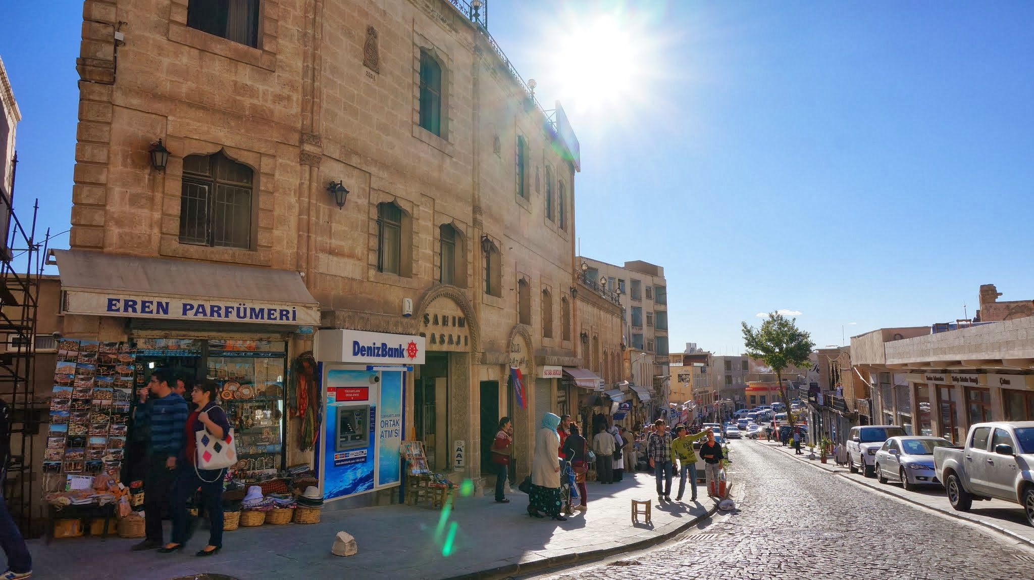 Mardin, Mardin Merkez/Mardin, Turkey